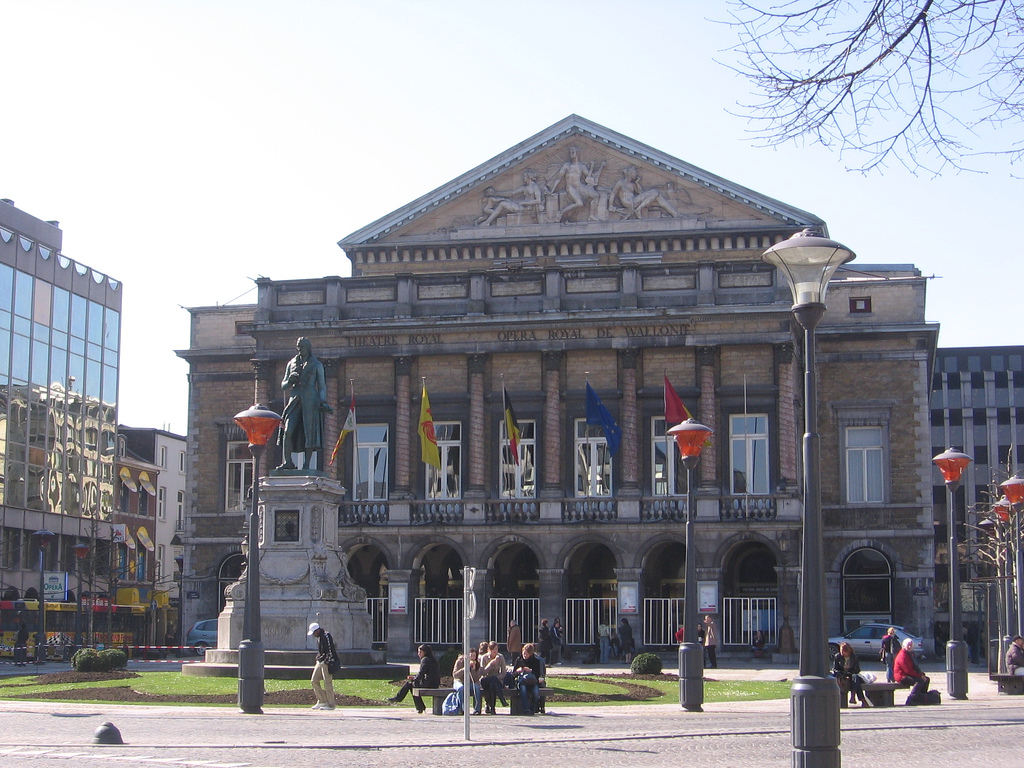 Liège, Belgium: Opéra royal de Wallonie